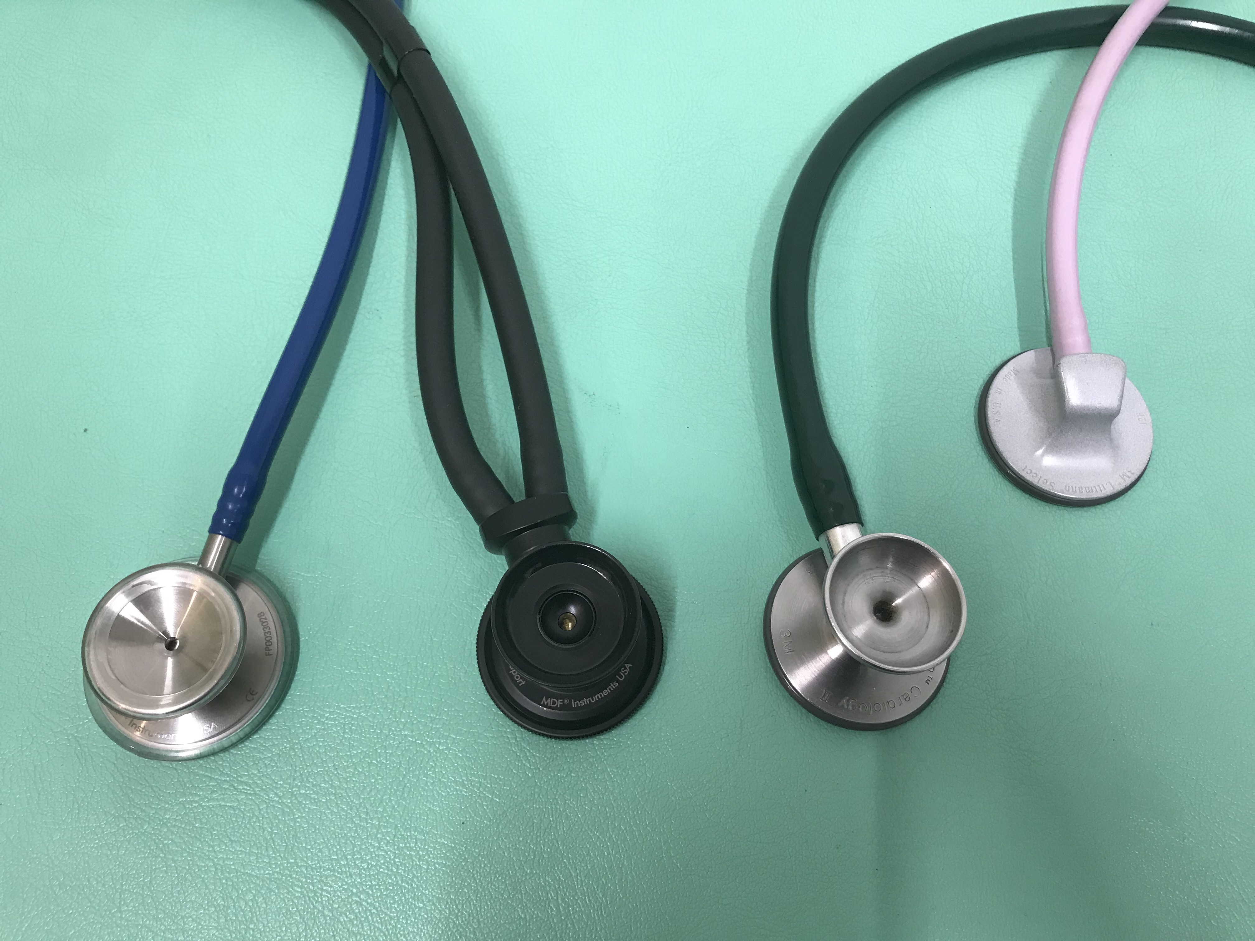 いろいろな聴診器